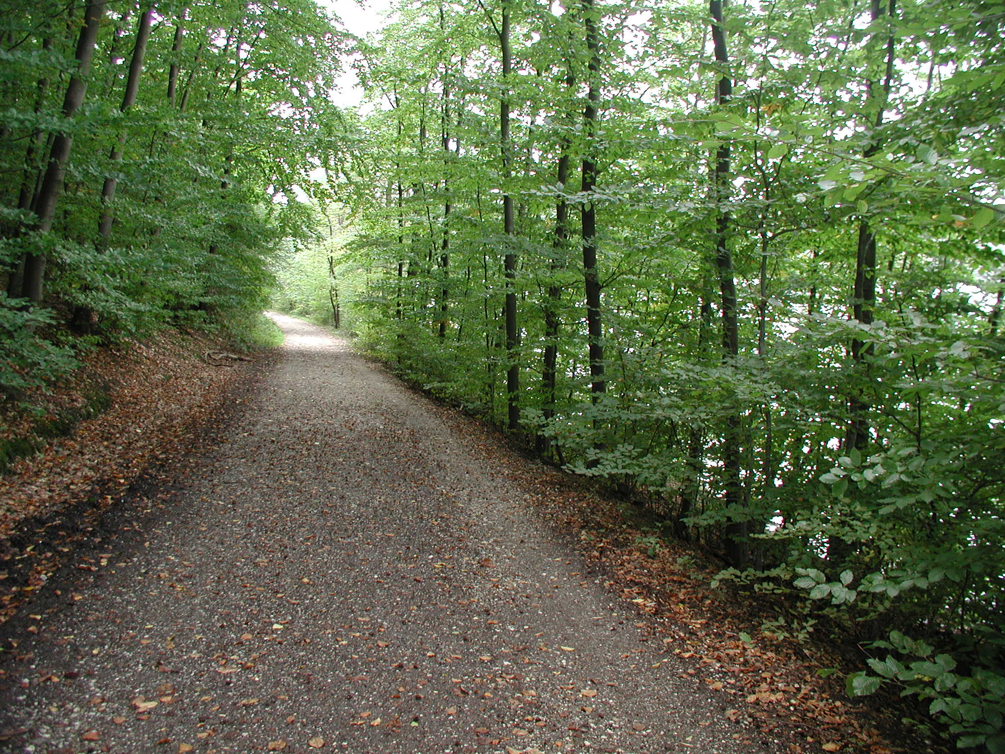 Heider Bergsee, Brühl/Rheinl.